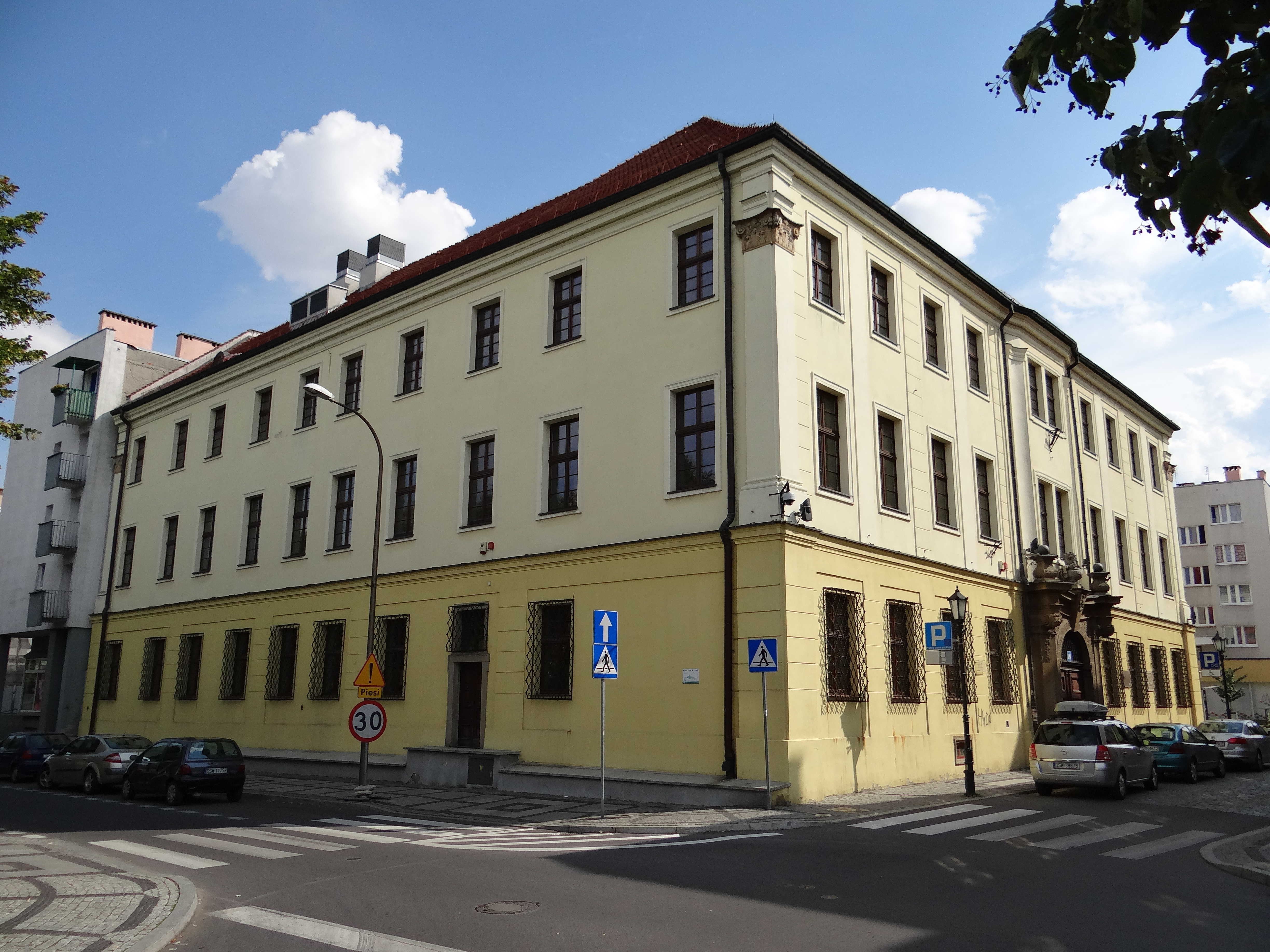 Świdnica, kuria opatów lubiąskich, XVIII